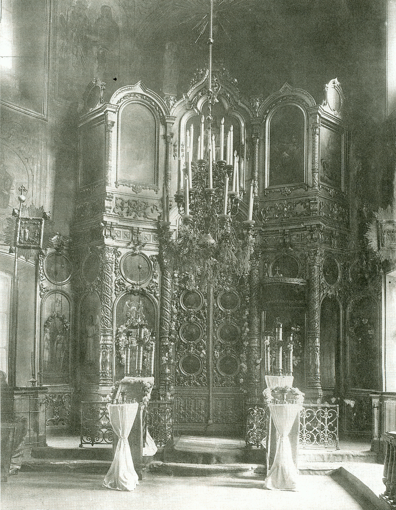 Главный иконостас церкви Спасителя Исцелителя расслабленного. Фото начала XX века. ГНИМА.